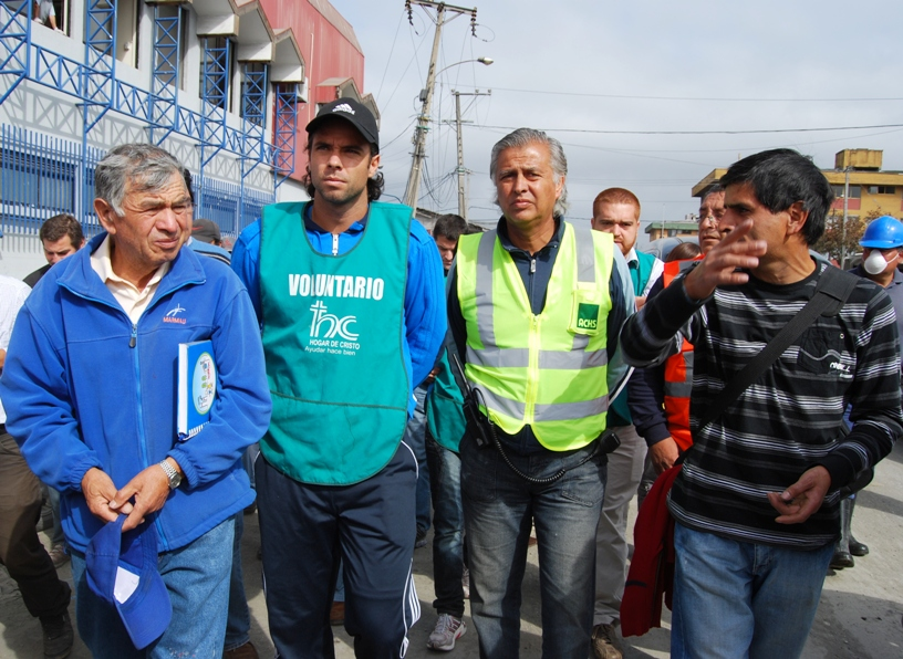 Fernando González vibró con los vecinos de caleta El Morro, Talcahuano